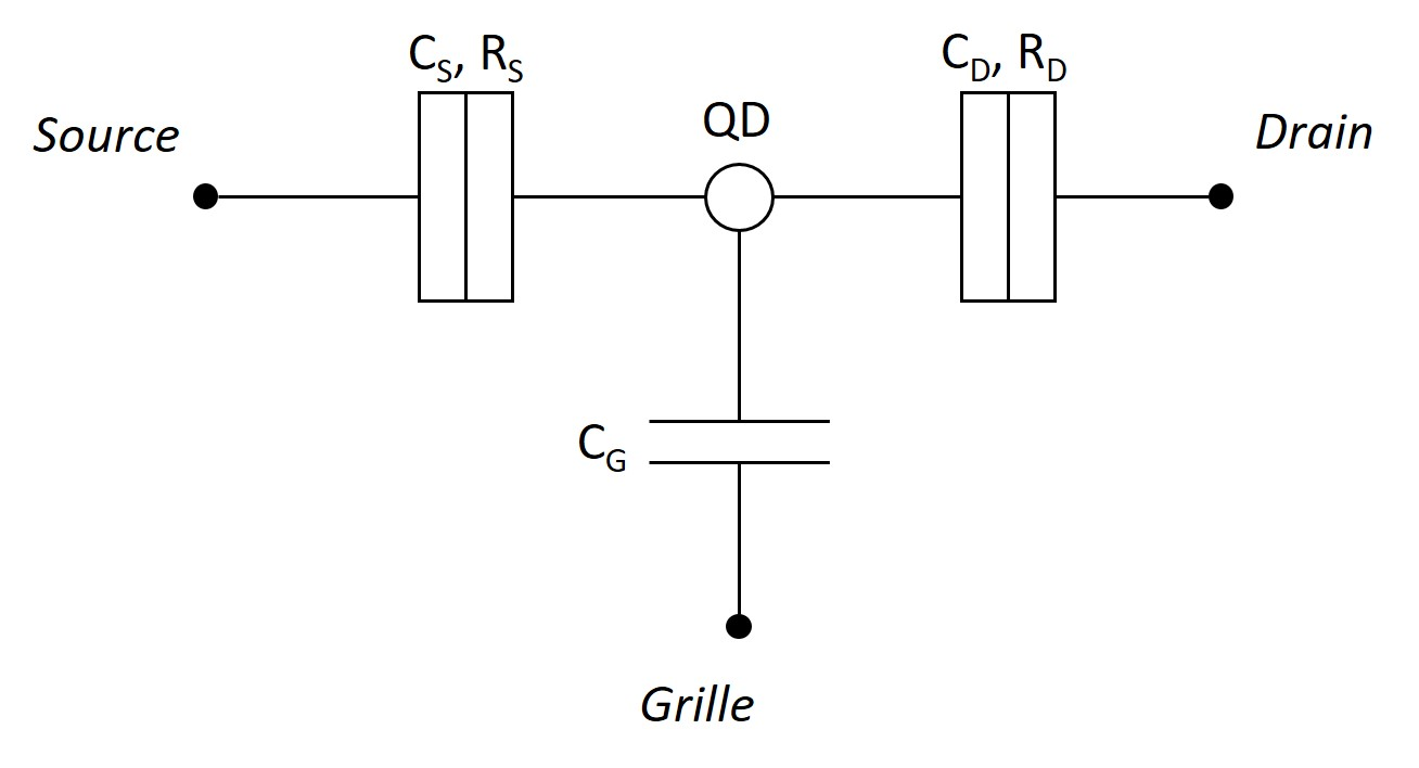 scheme SET